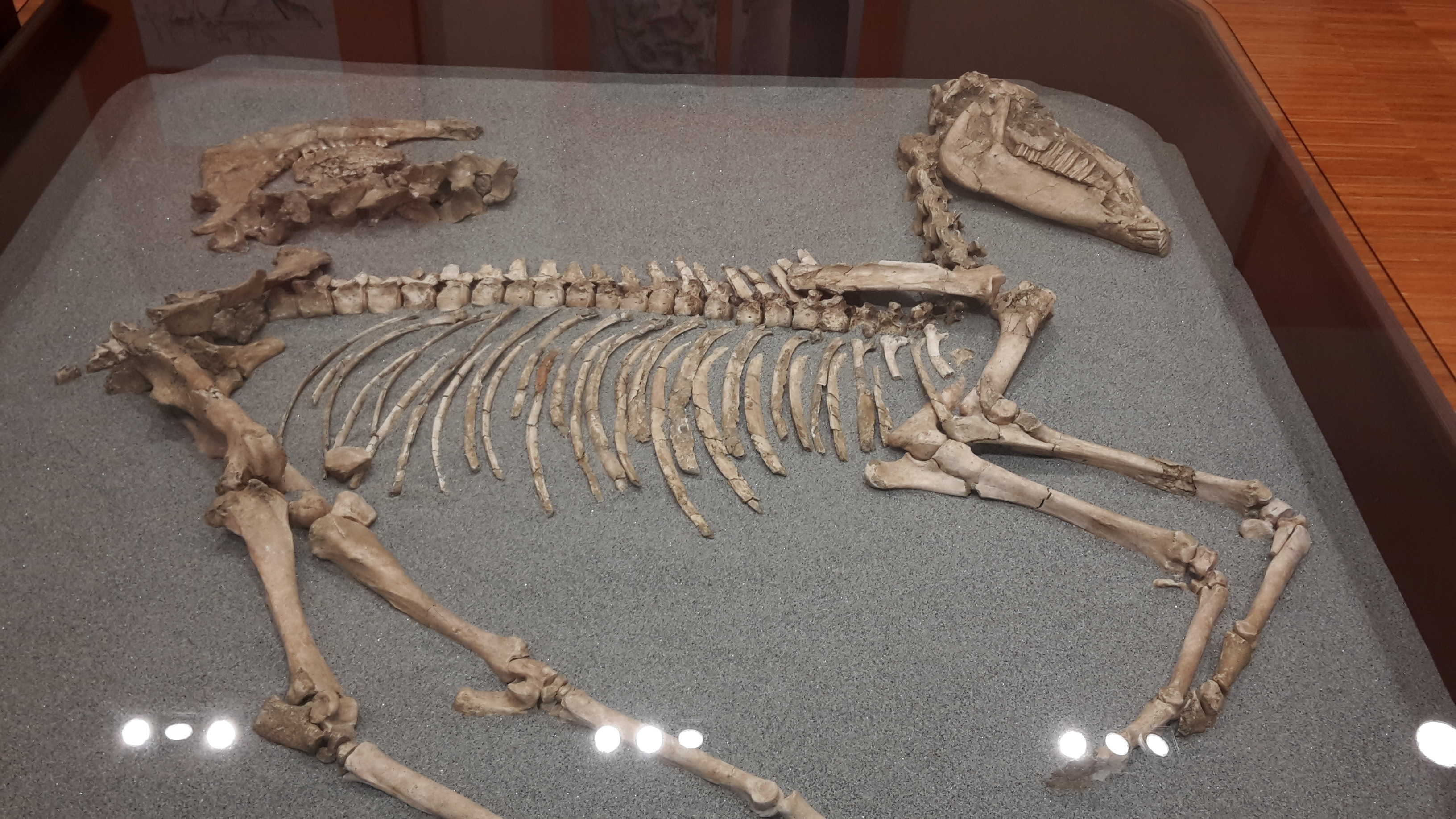 Schelettro presente nel museo